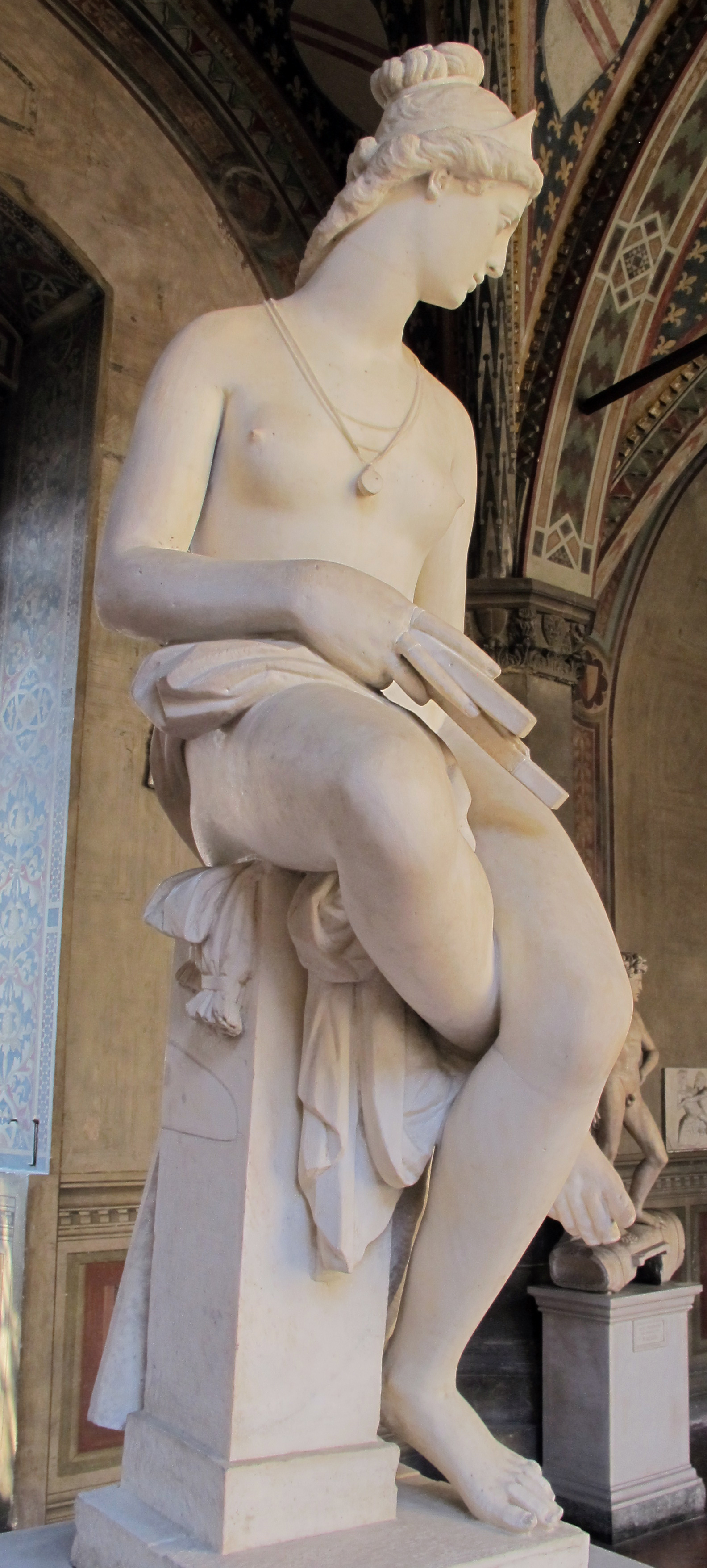 Giambologna, architettura, 1570 ca.